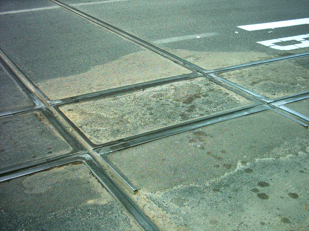 Cruzamento em nível da Linha de Cintura (Refer, 1668 mm) e da Linha 28 (Carris, 900 mm), em Alcântara, Lisboa